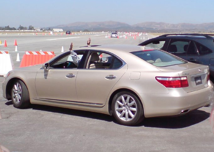 LS auto park